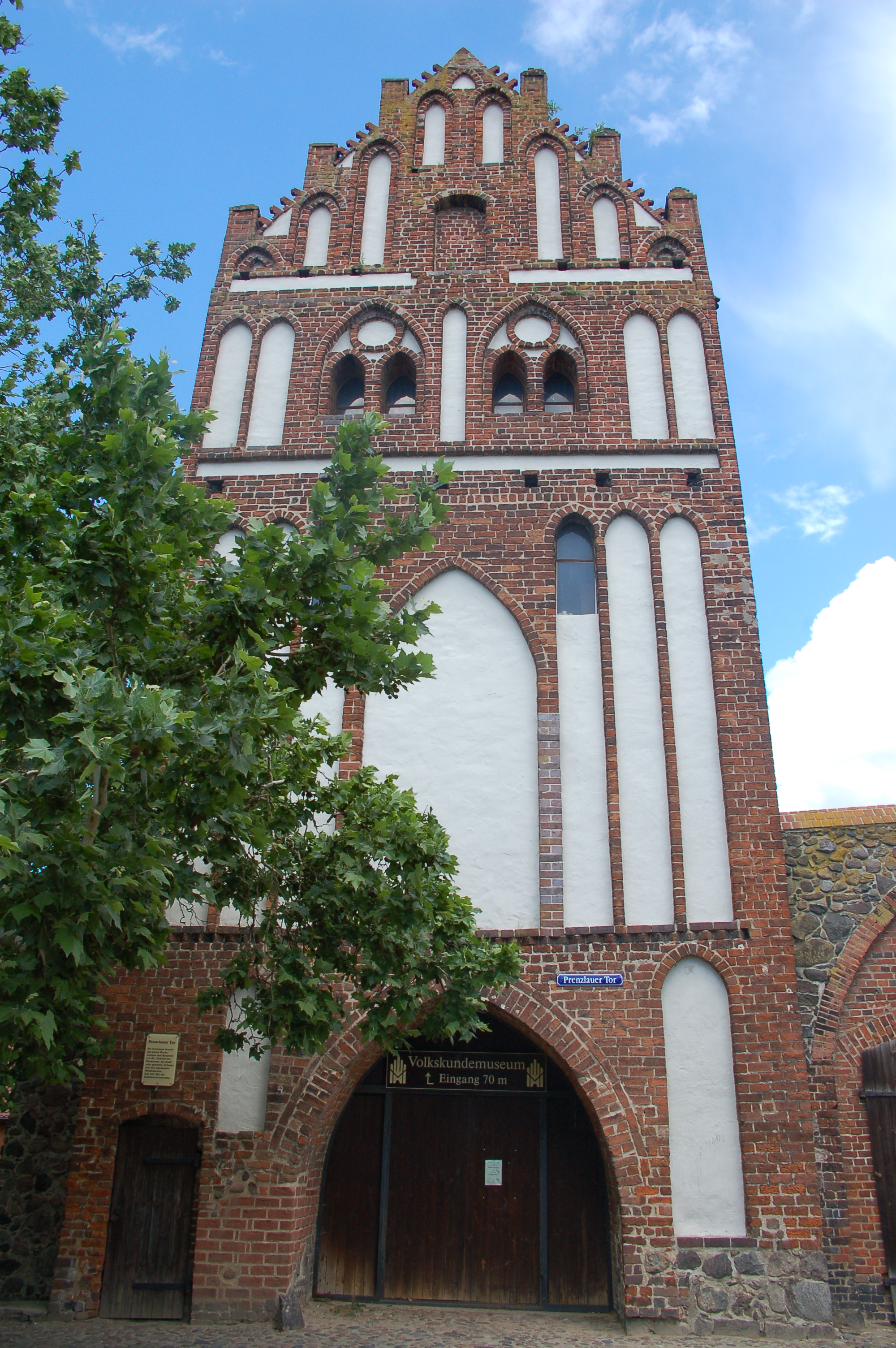 Prenzlauer Tor in Templin, Deutschland.